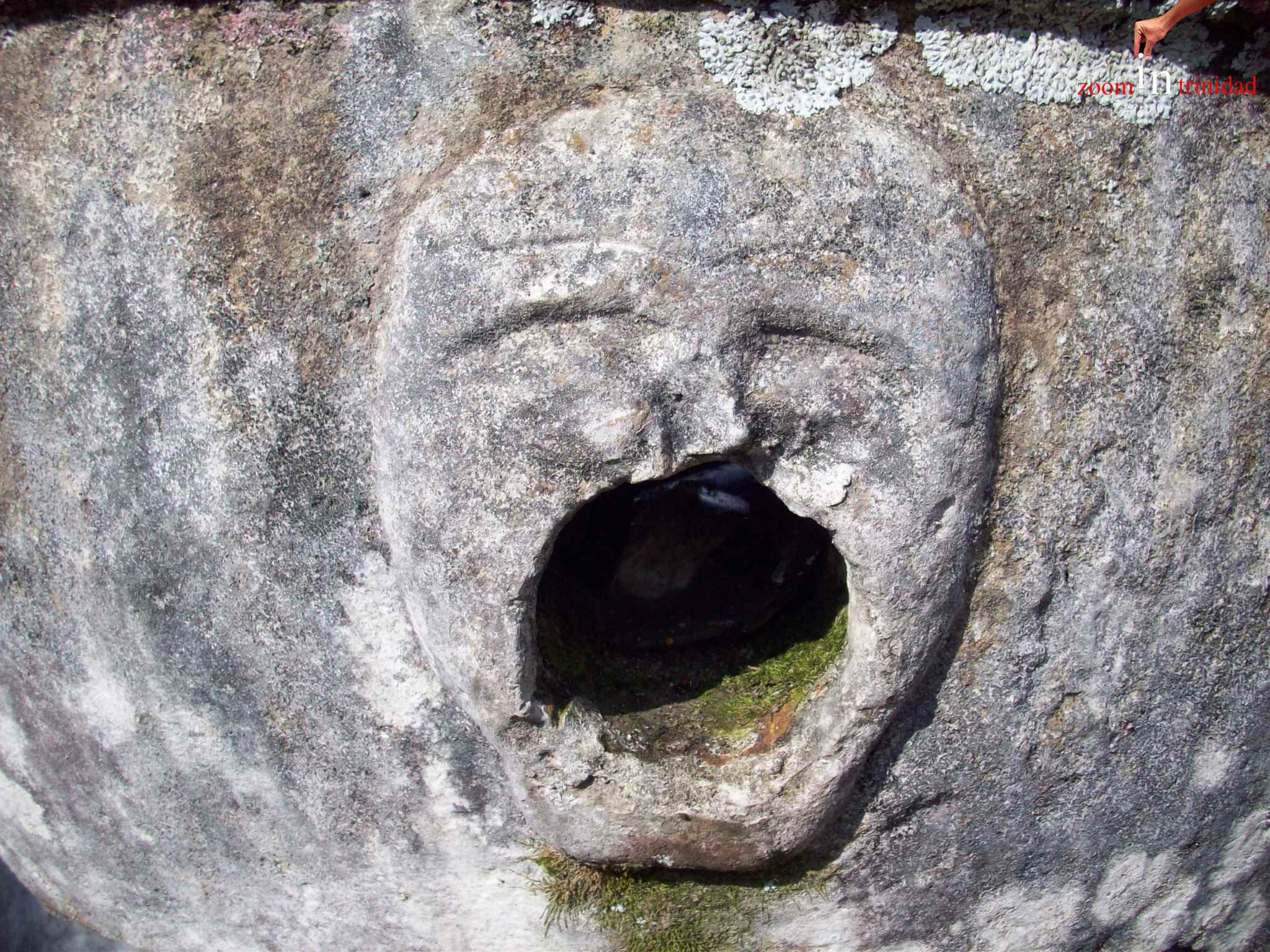 Posible obra indigena